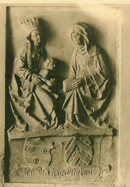 Fredeke von Wenden, Votivbild